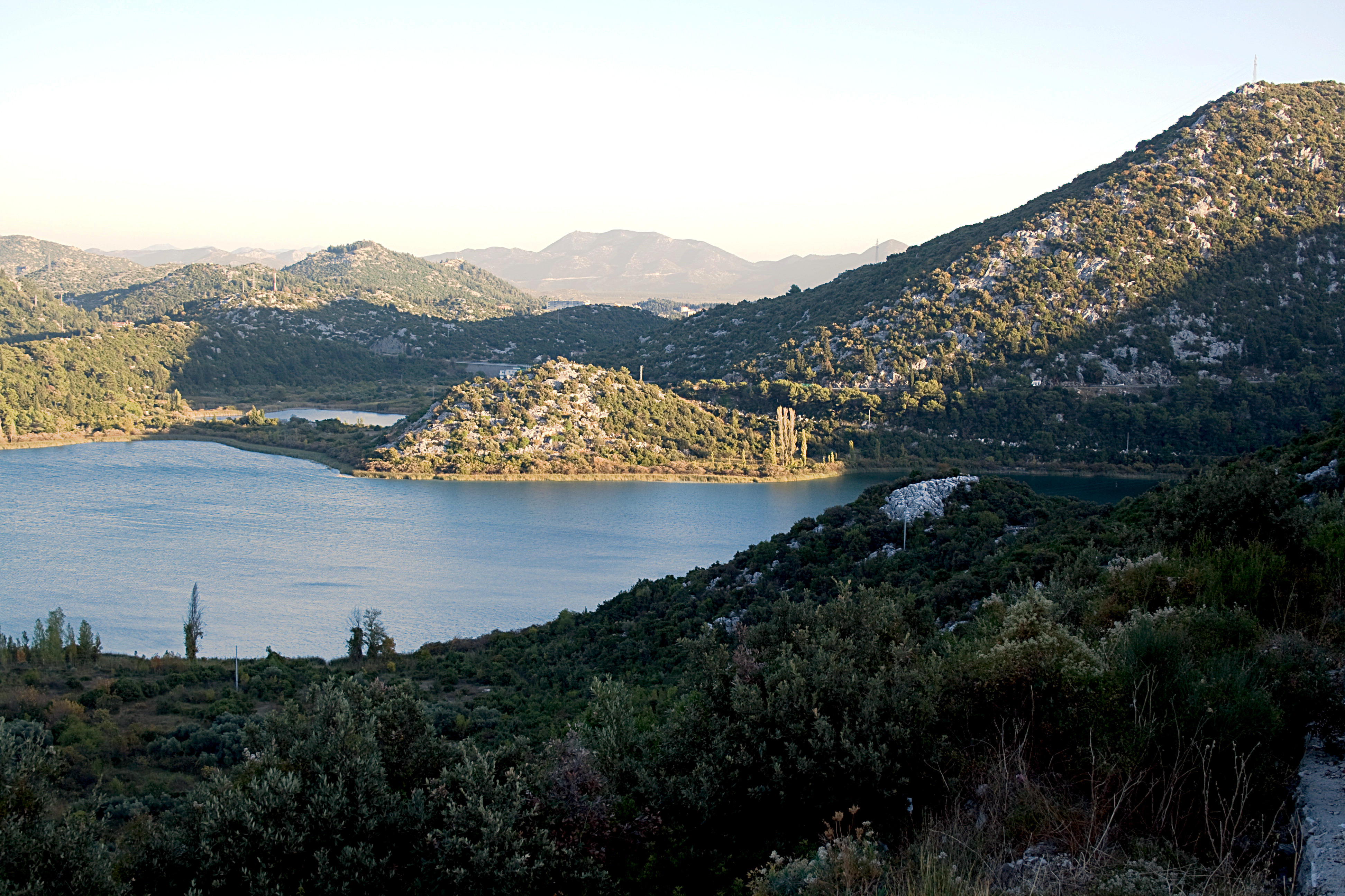 Baćina-Seen_von_der_Jadranska_Magistrala_gesehen